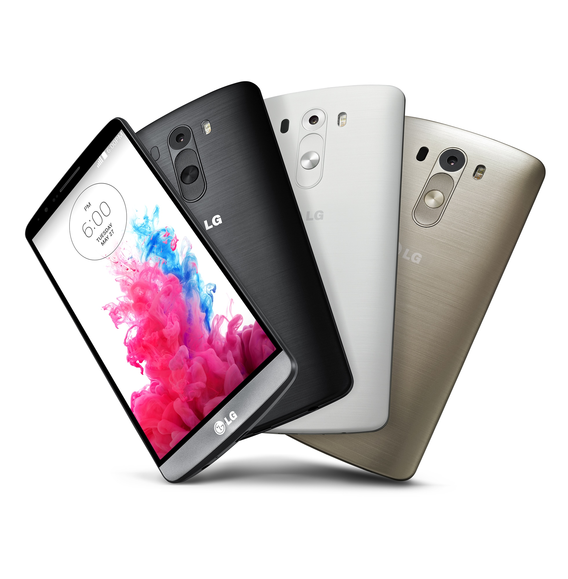 ■ 올 최대 전략 스마트폰 28일(한국시각 기준) 전 세계 동시 공개 □ 세계 6개 도시에서 24시간 이내 행사 완료 □ 28일 한국 출시 이어 세계 170여 통신사 순차 공급 예정 ■ ‘Simple is the New Smart’ 컨셉트 반영 □ 사용자 경험 최우선의 G시리즈 철학 계승 ■ 글로벌 런칭 첫 쿼드HD 스마트폰 □ 쿼드HD(2,560x1,440) IPS 디스플레이 탑재 □ 538ppi 초고해상도 구현… HD의 4배, 풀HD의 2배 ■ 레이저 오토 포커스로 빠르게 초점 잡는 카메라 □ 후면에서 레이저 빔 쏘아 피사체와의 거리를 초고속으로 측정 □ 어두운 곳에서도 선명하게 찍히는 전면 카메라 □ 오디오까지 배려한 비디오 레코딩 ■ 심플함을 담은 입체 디자인 □ 매끈한 일체감 느껴지는 전면 디자인에 심플한 GUI 적용 □ 후면엔 인체공학적 곡률 채택해 한 손에 들어오는 그립감 구현 □ 메탈릭 스킨 후면 커버, 더 편해진 후면키 채택 ■ 사용자를 이해하는 진정한 스마트 UX □ 빅데이터 분석해 오타 줄여주는 ‘스마트 키보드’ □ 사용 패턴 기억해 맞춤형 정보 제공하는 ‘스마트 알림이’ □ 노크 코드, 컨텐츠 잠금, 킬스위치로 강화된 ‘스마트 시큐리티’ ※ Social LG전자 에서 관련 보도자료를 확인하실 수 있습니다.